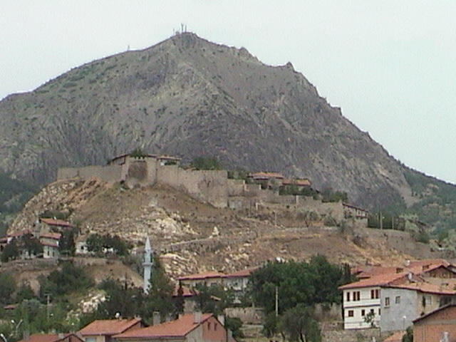 İskilip kalesi arkada Yivlik Tepesi